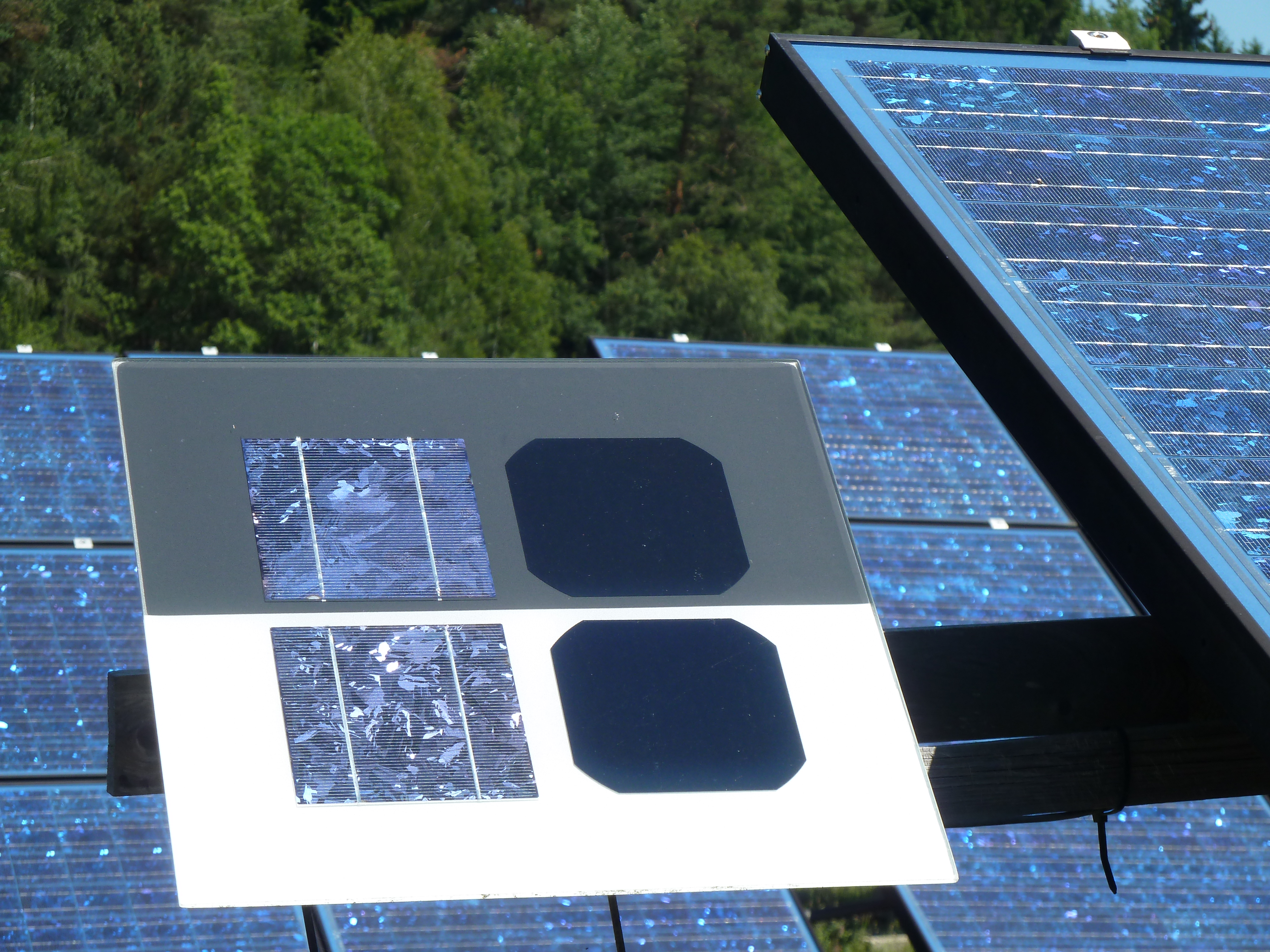 monocrystalline polycrystalline solarcell